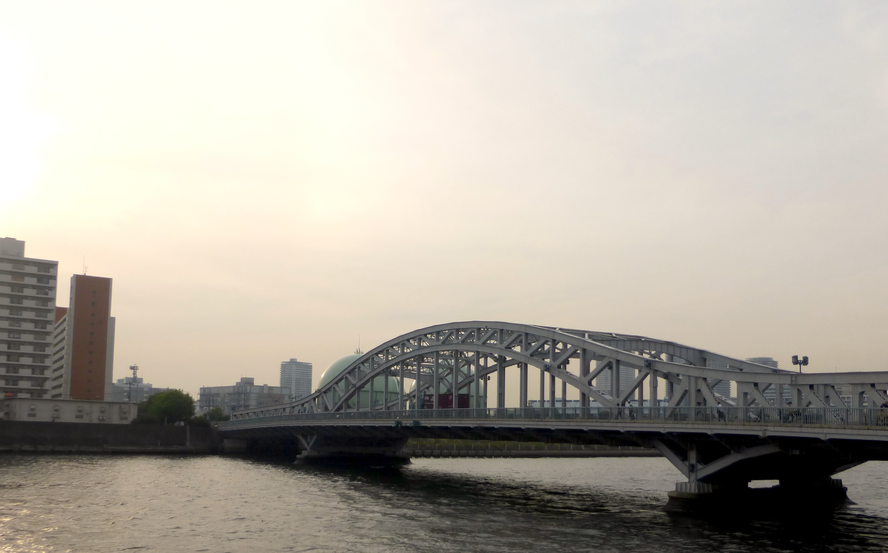 白鬚橋 (Shirahigebashi, shirahige bridge)